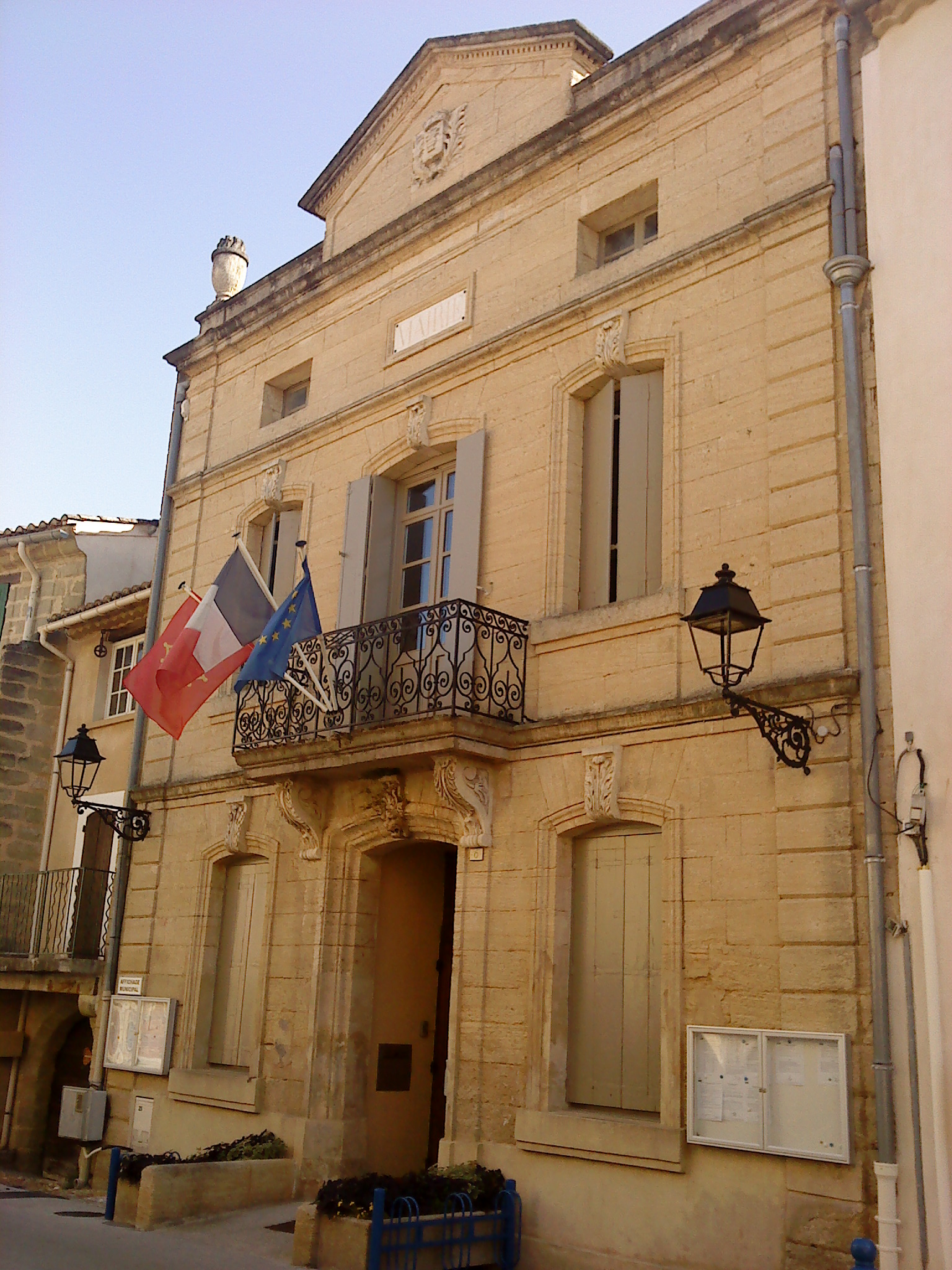 Mairie de Saint-Quentin-la-Poterie, Gard, France